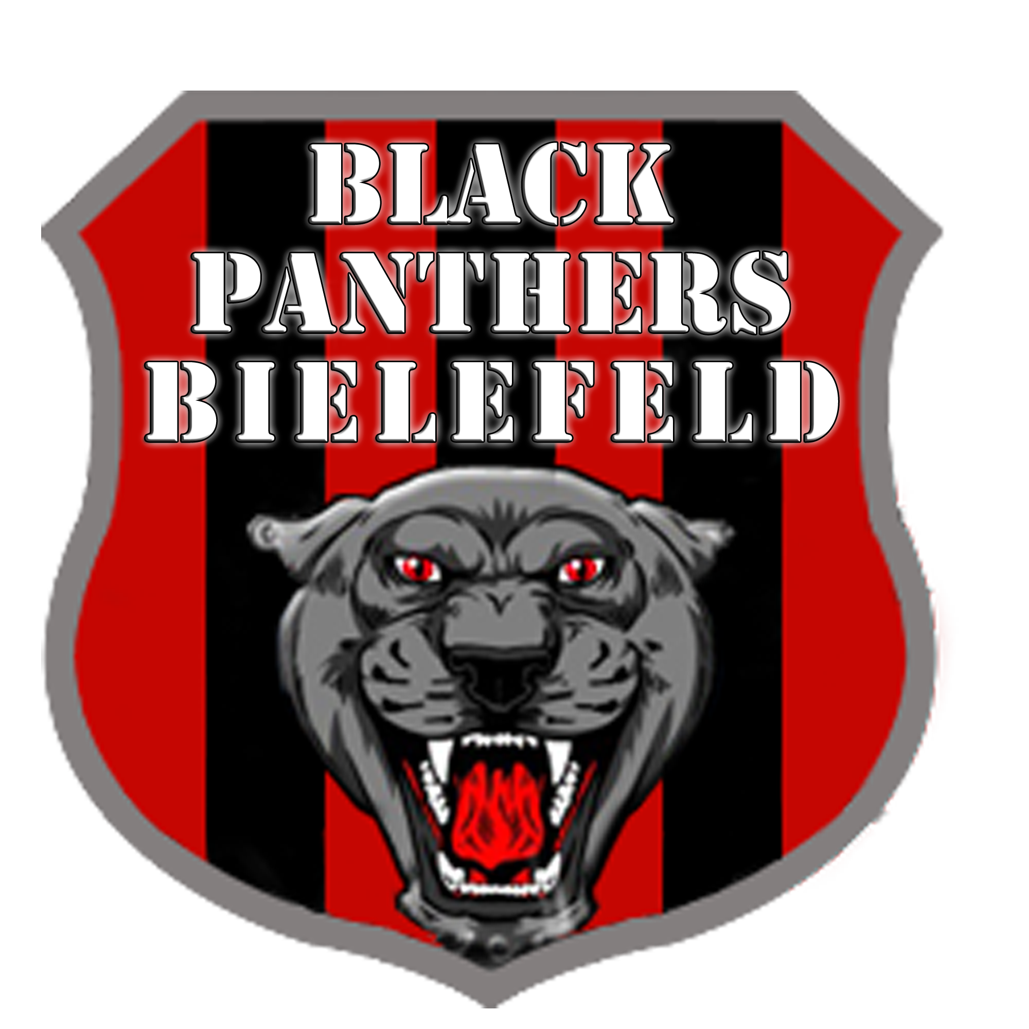 Das ofizielle Wappen der Black Panthers aus Bielefeld